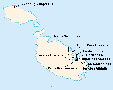 Répartition des clubs en First Division Maltaise 1976-1977.